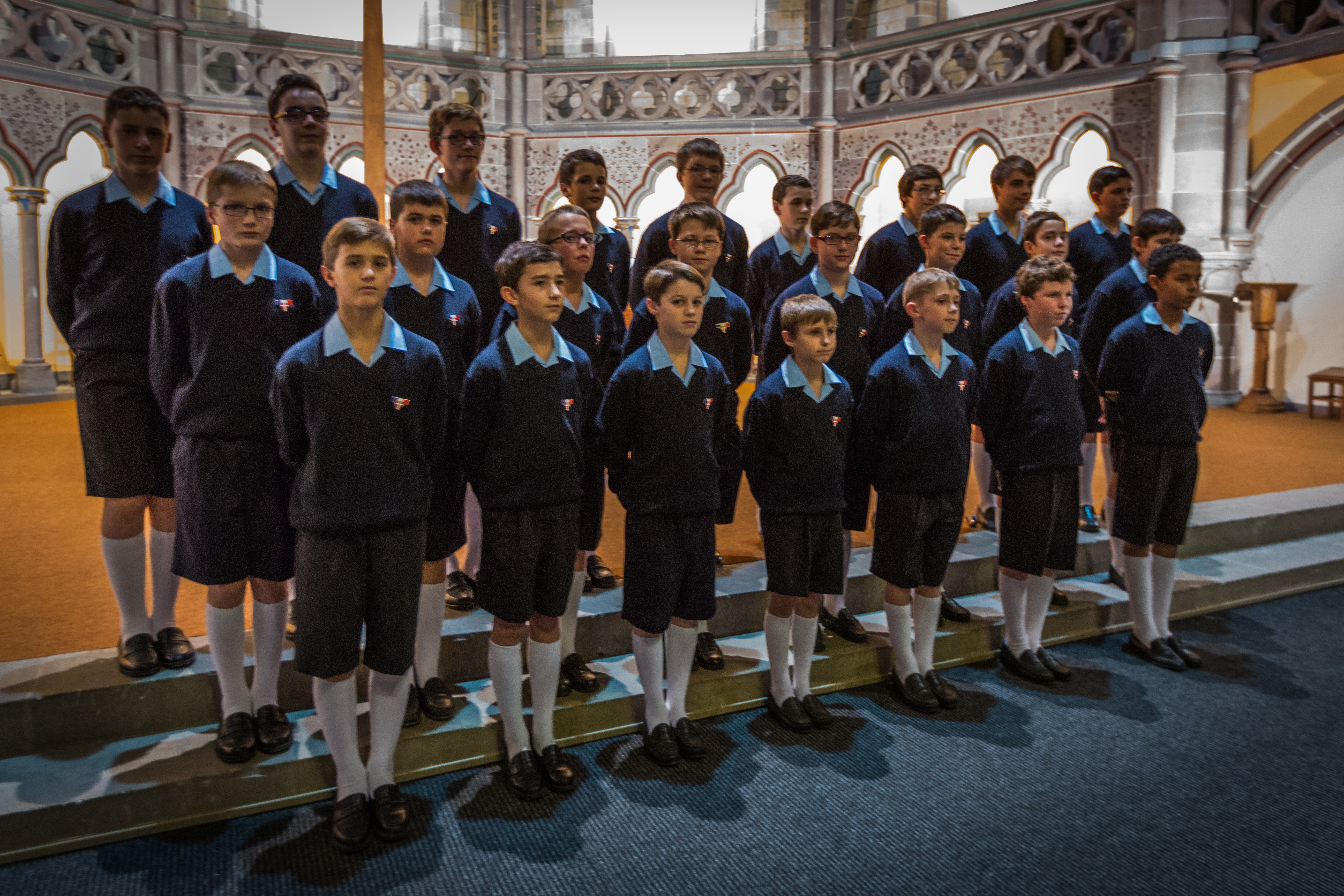 La Manécanterie des Petits Chanteurs à la Croix de Bois en concert à l’église Saint-Paul de Strasbourg pour un concert organisé par la l’Ordre international des Anysetiers, chapitre de Strasbourg, au profit de l’association Semeurs d’Étoiles' le 9 novembre 2013.